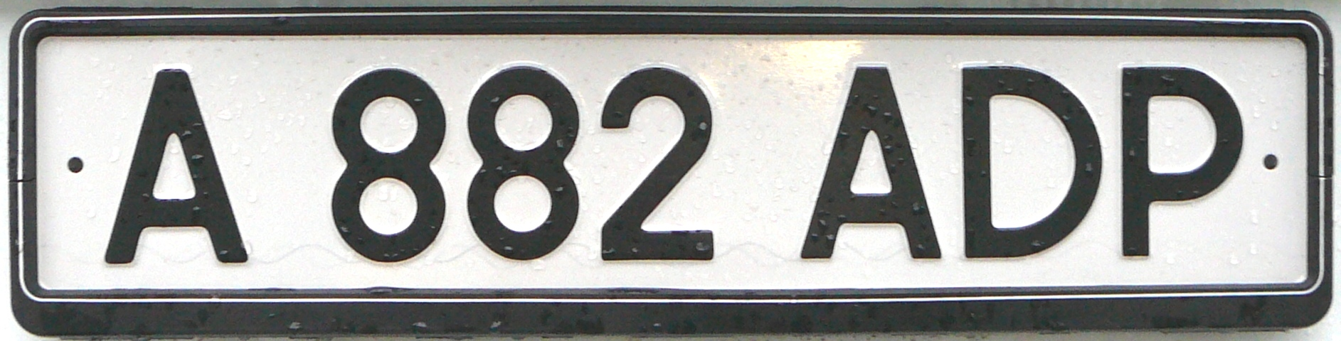 Казахстанский автомобильный номер выданный на физическое лицо с окончанием серии на "Р" Буква "А" - Алма-Ата.